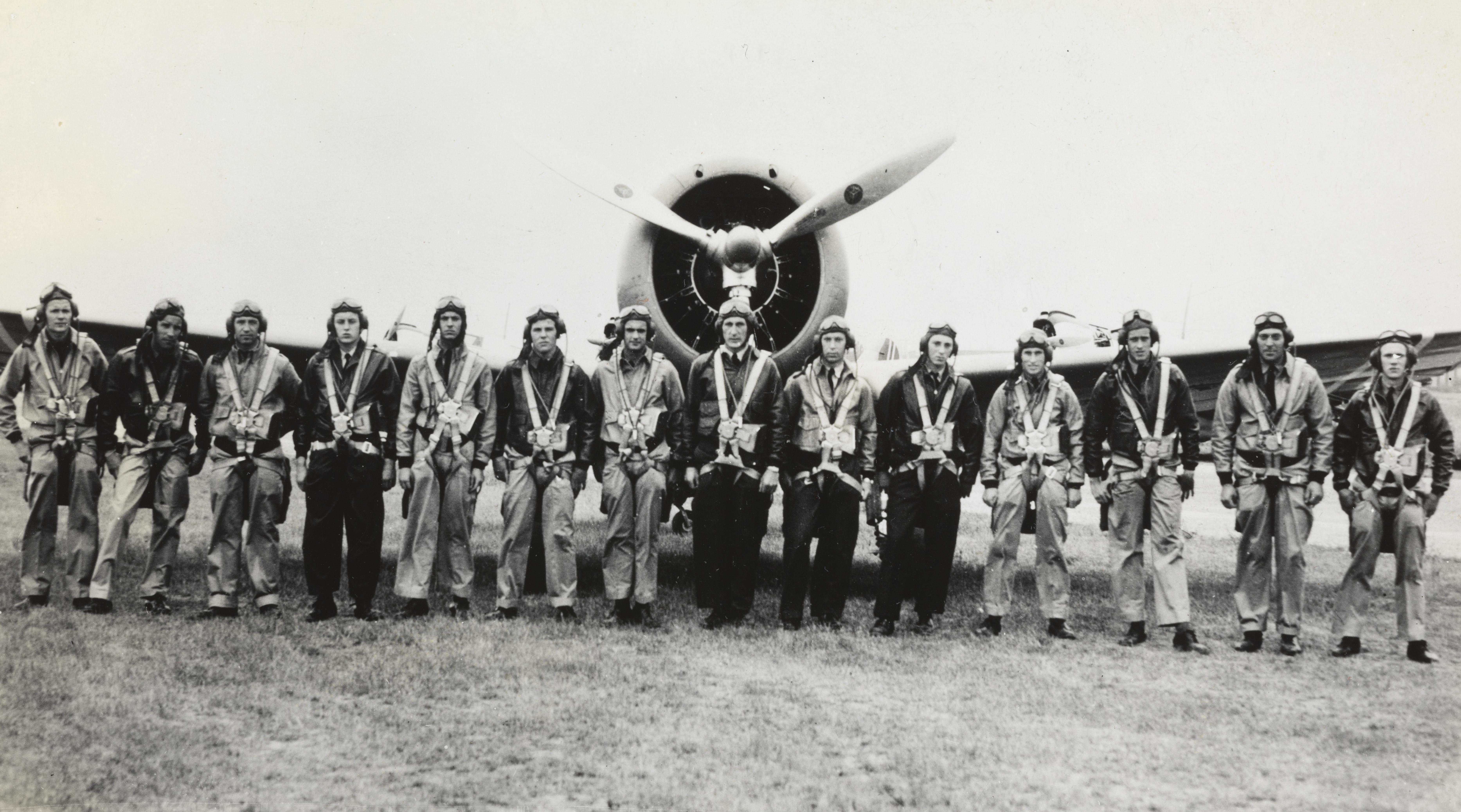 Bildet er hentet fra Nasjonalbibliotekets bildesamling. Flyvåpnenes treningsleirs første kull jagerflygere. Fra venstre: Ottar Malm, Tim Heiberg, Erik Fossum, Søren Liby, Thor Arbo Wærner, Helge Sognnæs, Ulf Wormdal, Jon Tvedte (instruktør), Alf Widerberg, Nils Ringdal, Per Schønberg, Svein Heglund, Olai Grønmark, Martin Gran